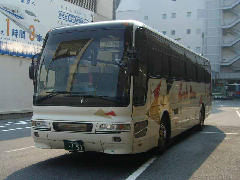 登録番号 広島200か・151 広交観光所属 しまなみライナー用 2006年6月5日 広島バスセンターにて撮影